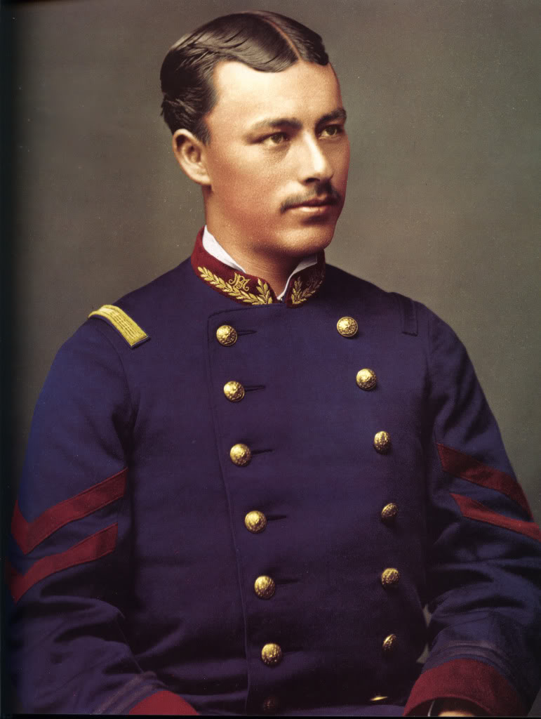 Teniente Antonio Nuñez Batallon Civico Movilizado "MELIPILLA". ( El ejercito chileno, utilizo como medio de identificacion tactica de las unidades en combate cintas y numeros colocados en las mangas de las chaquetas de uso corriente.- en el primer caso podemos observar en las mangas de este oficial, el simbolo tactico de la 2º Division al que estaba integrado el Batallon "Melipilla" cuya identificacion luce en el cuello